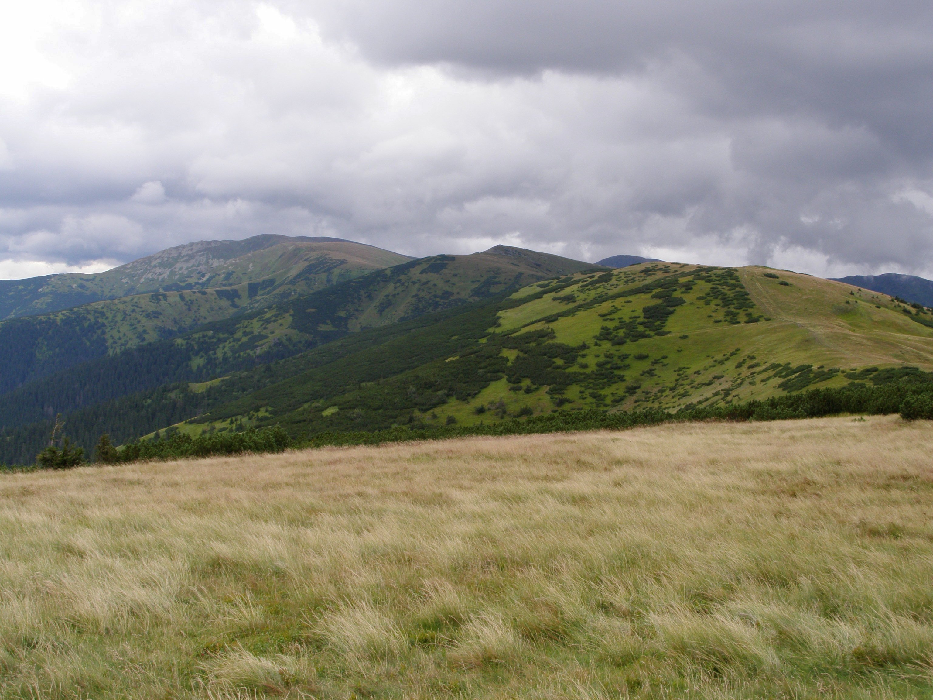 Nízké Tatry, Ďumbierské Tatry, pohled od západu zleva na vrcholy Chabenec (1955 m), Ďurková (1750 m) a Zámostská hoľa (1612 m)